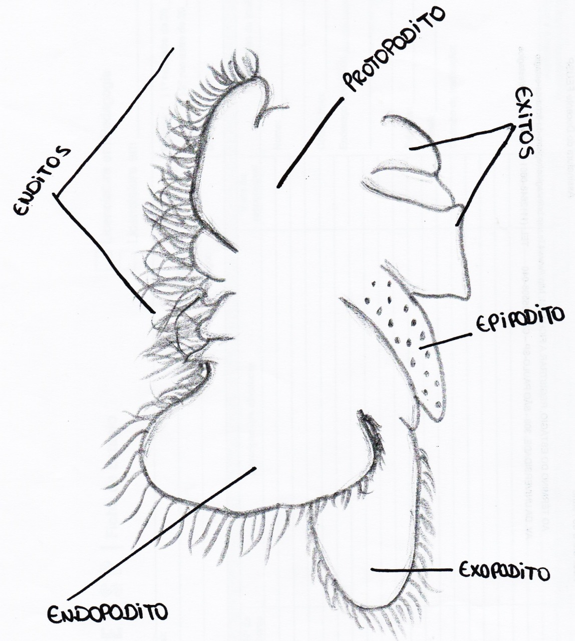 Esquema de um endito típico de Anostraca.